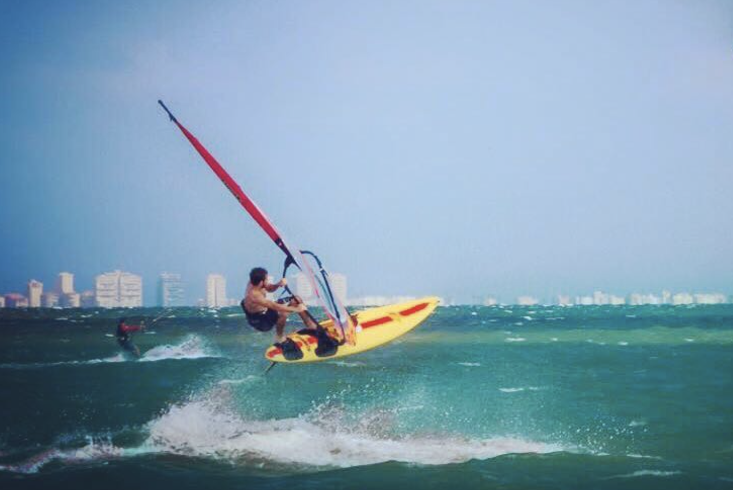 Salto Windsurf Mar Menor